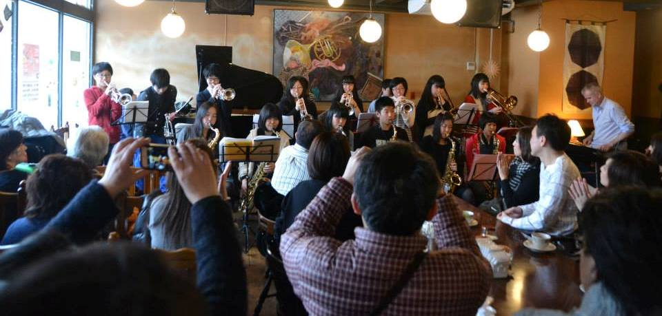 Barnas Jazzcafé på klubben Kamihikoki i Sapporo i mars 2014